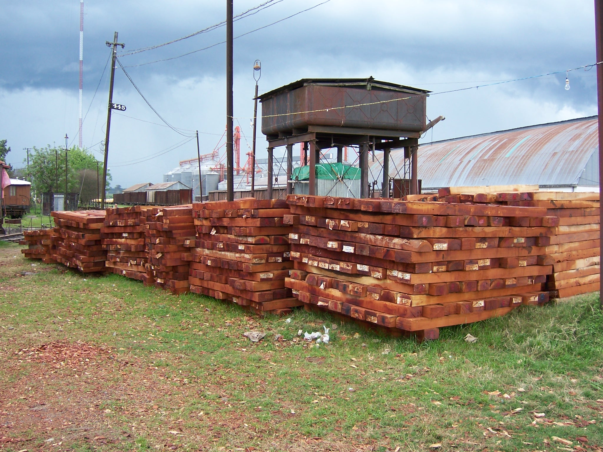 Durmientes de madera de quebracho colorado de origen argentino. Material utilizado en la renovación de la Línea a Rivera, zona de Tacurembó, Uruguay.